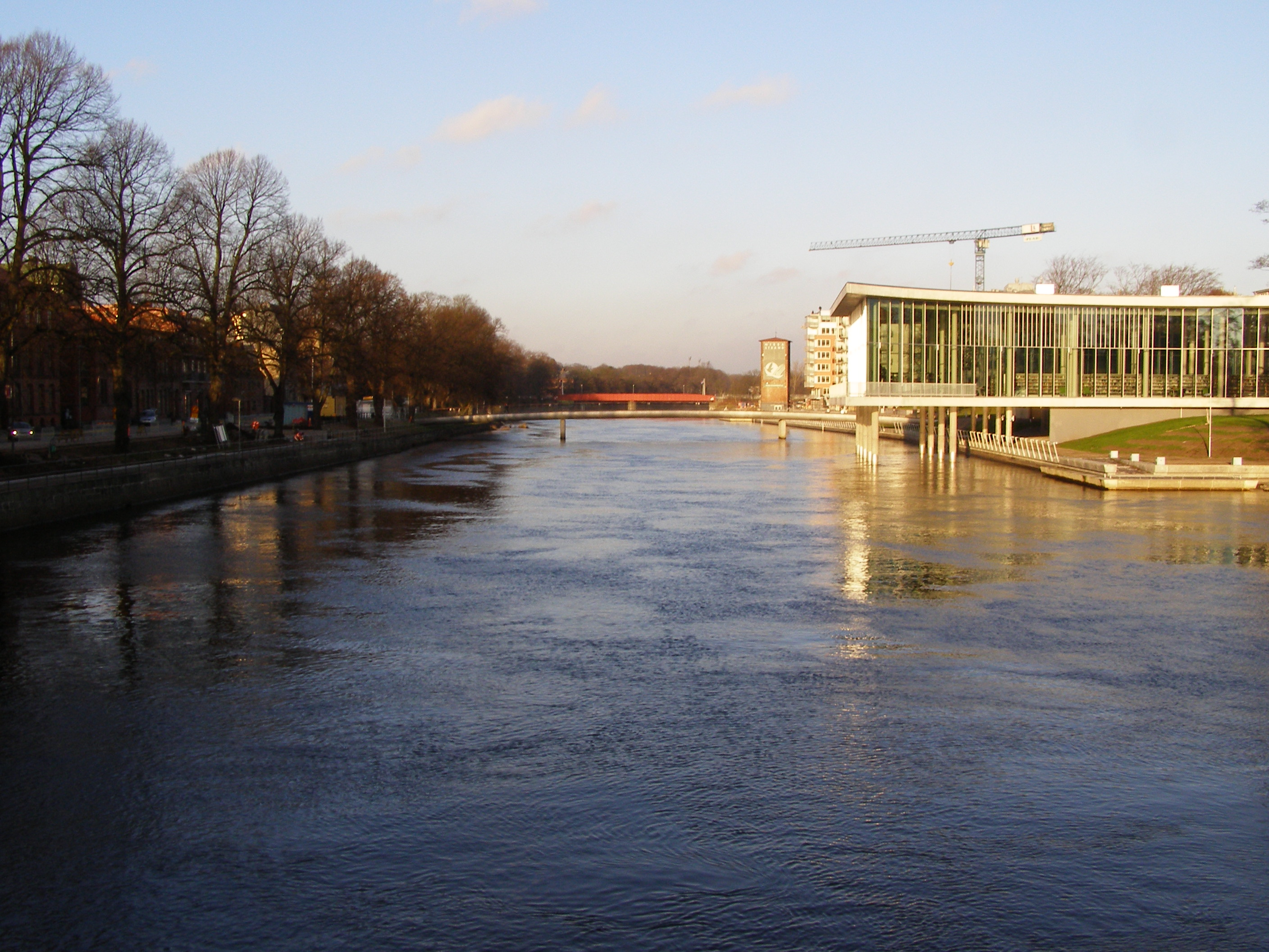 Nissan, från Österbro i Halmstad. Med Stadsbiblioteket till höger.